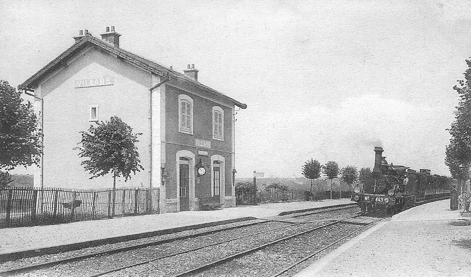 Ancienne gare de Villabé (Essonne, France), au début du XX° siècle.